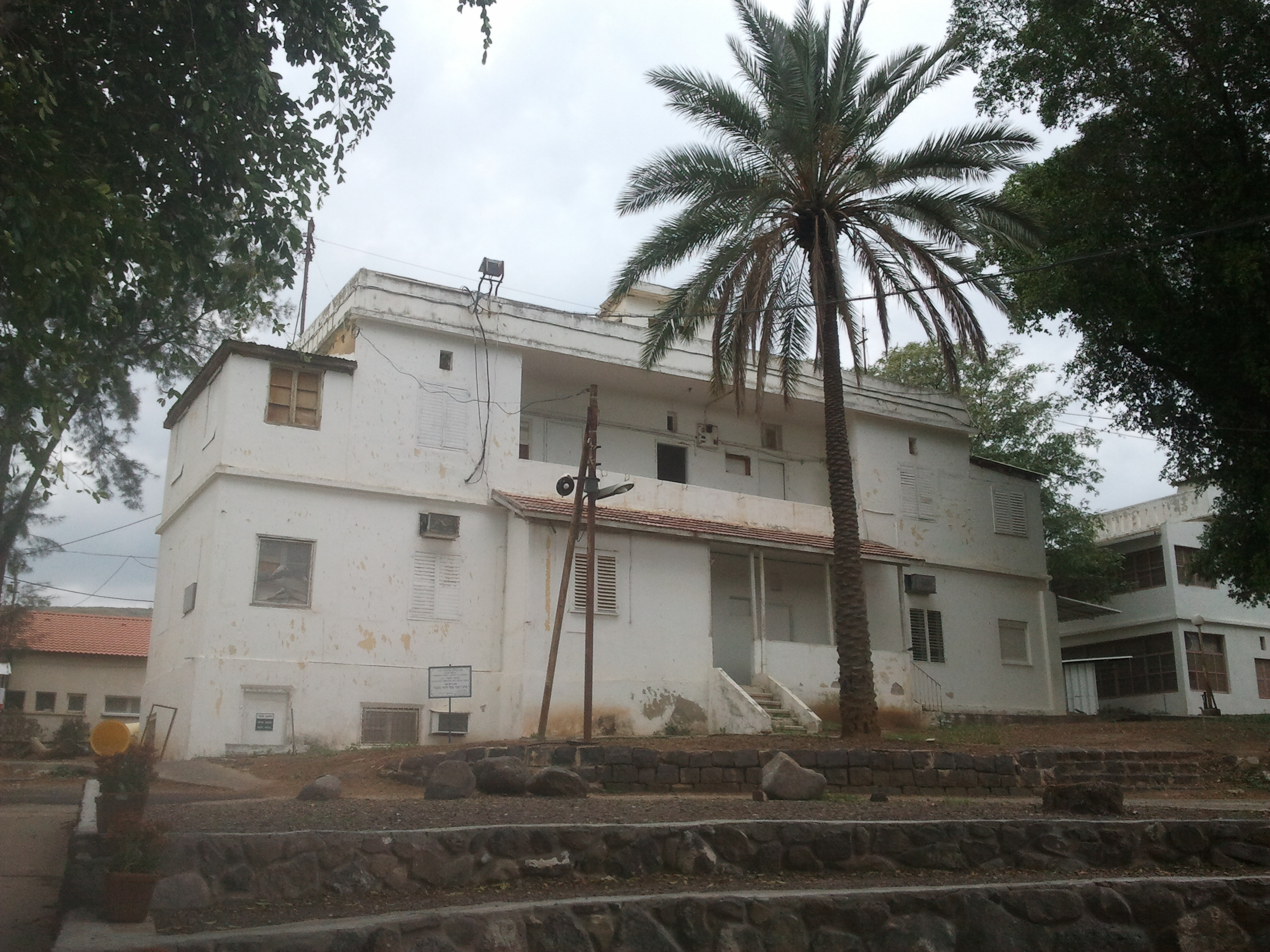 בית ילדותה של נעמי שמר בקבוצת כנרת נעמי התגוררה בחדר הקיצוני הימני בקומה השנייה